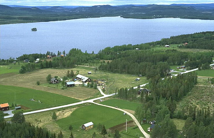 Motiv: Laiksjö by Nyckelord: Flygbilder, Riksintressen Kategori: JordbruksbyLaiksjö by